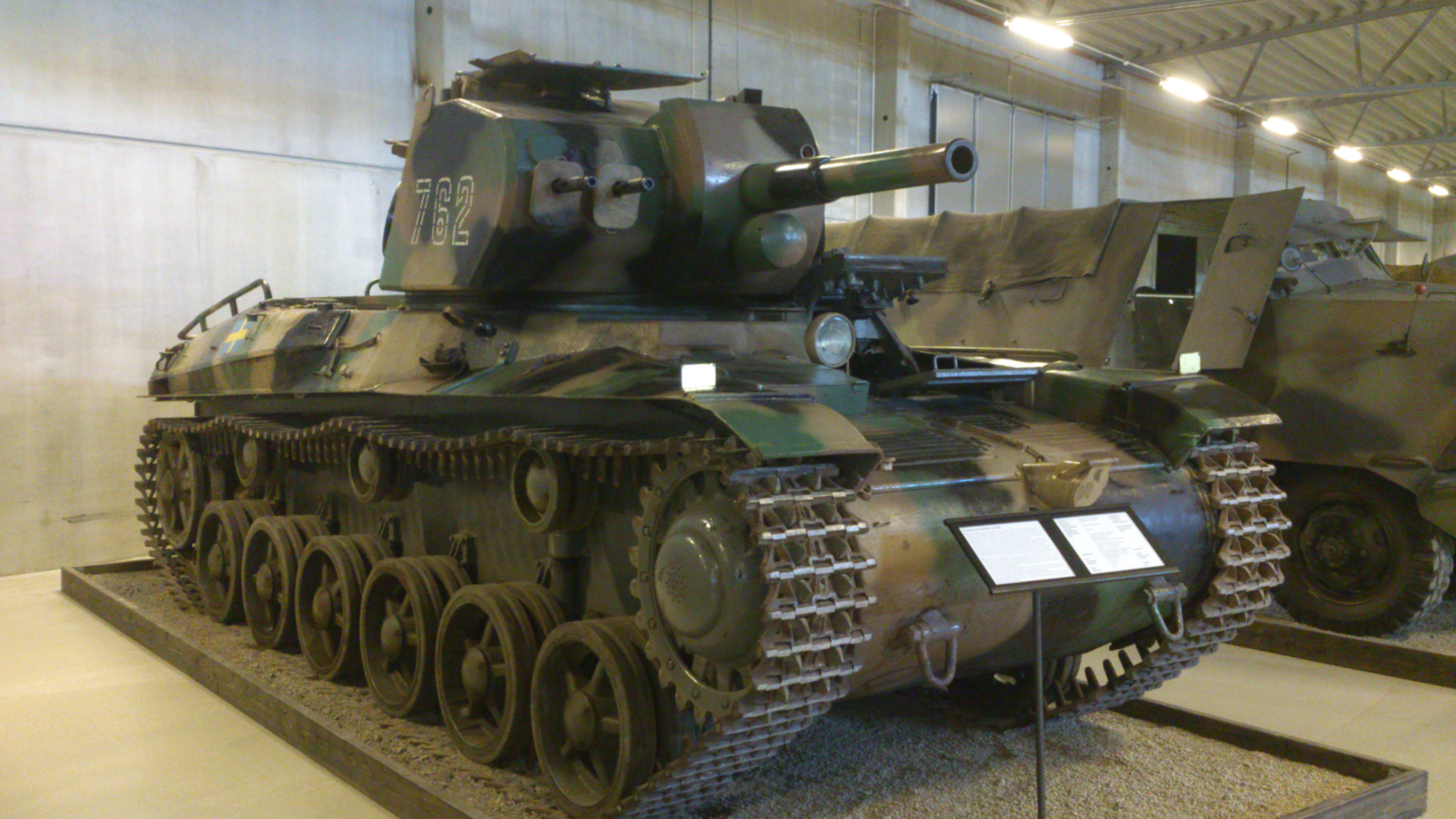 Stridsvagn M 42 på Försvarsfordonsmuseet Arsenalen i Strängnäs